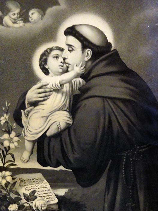 Santo Antônio, gravura